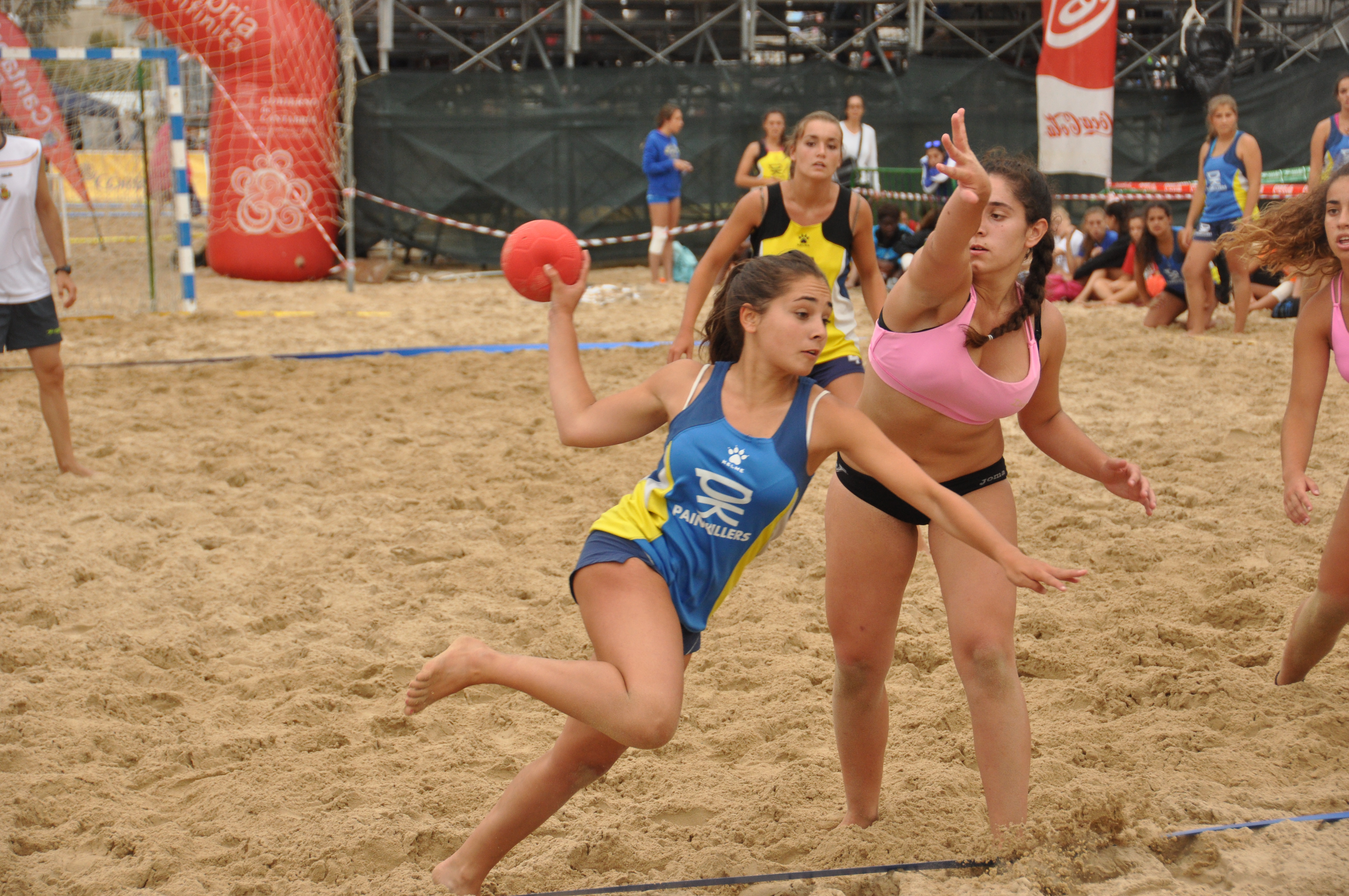 Imágenes del primer día de competición en el Campeonato de España de Balonmano Playa, que se celebra entre el 1 y el 3 de agosto en el municipio cántabro de Laredo.